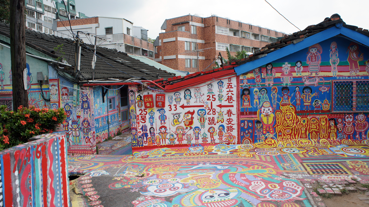 台中市南屯區干城六村春安路56巷（2009-02-07）